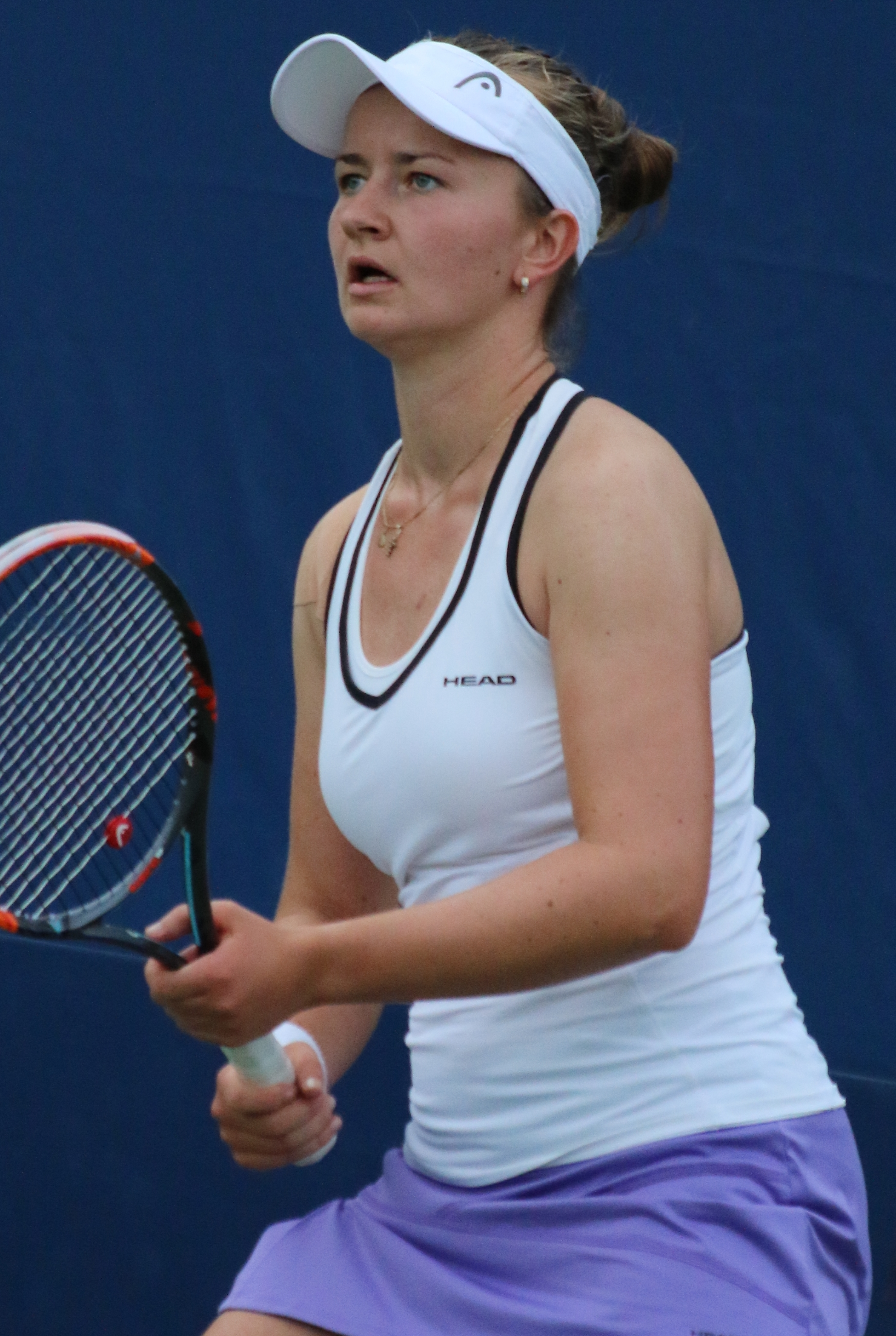 Krejcikova US16 (10)